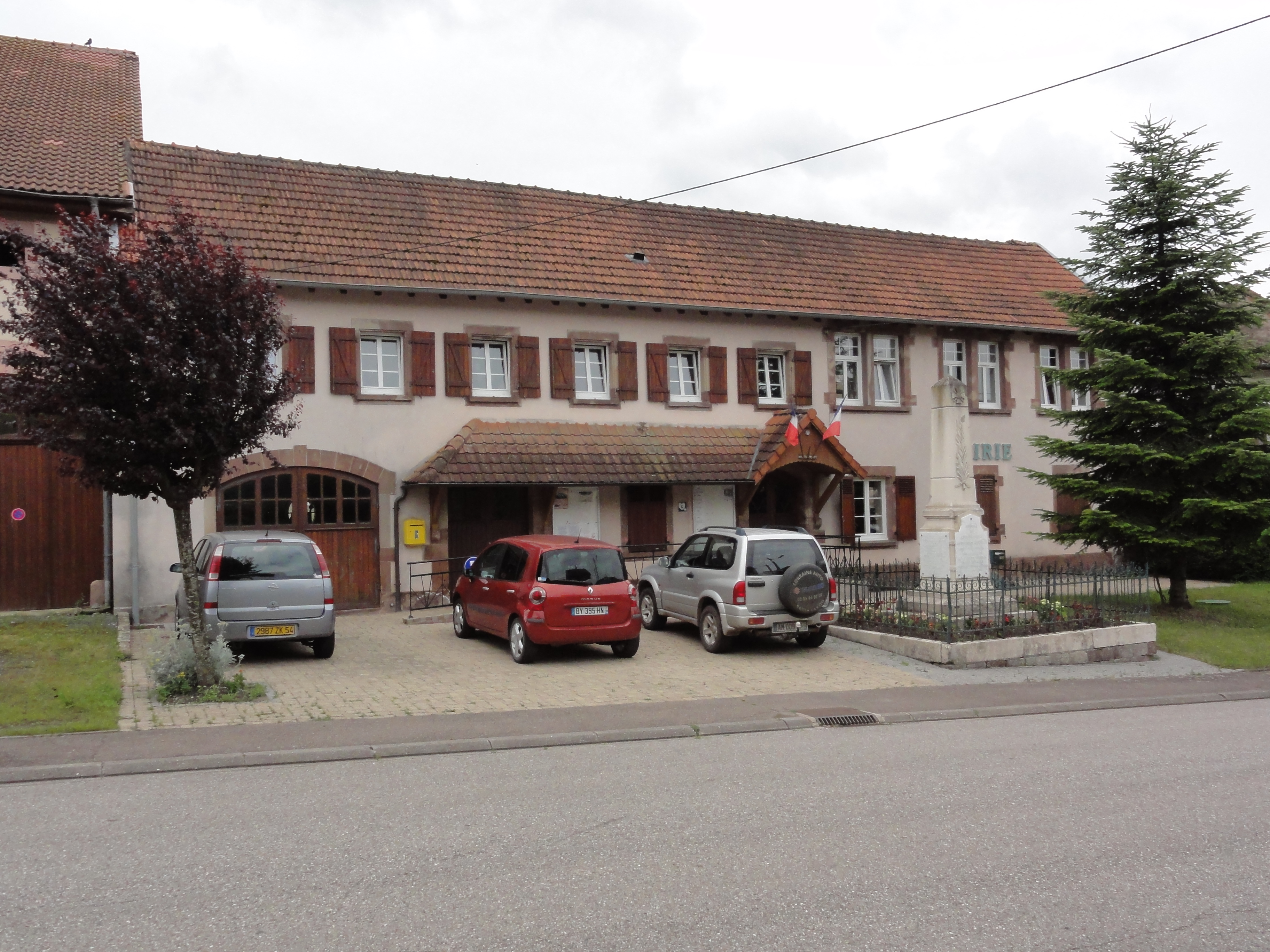 Vaucourt (M-et-M) mairie